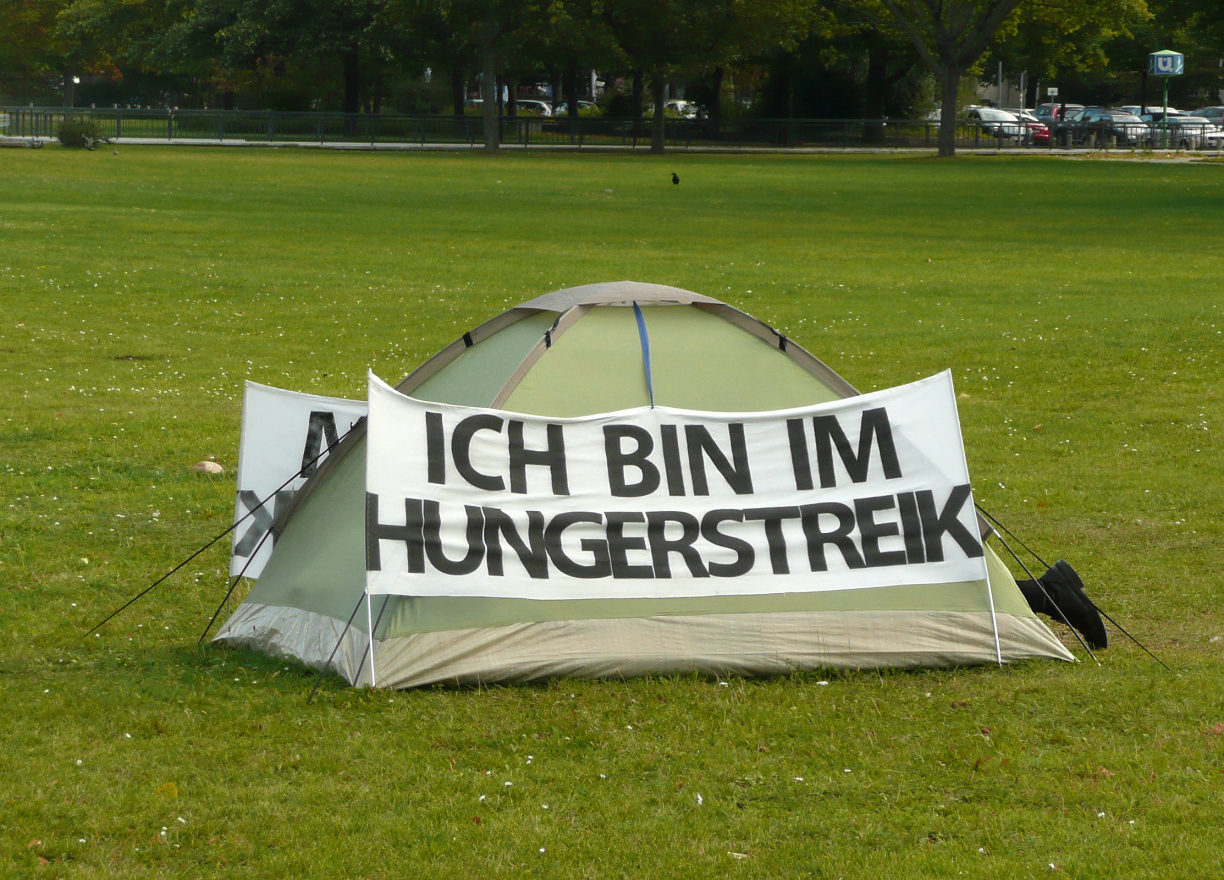 Campingzelt auf dem Waterlooplatz in Hannover eines hungerstreikenden Vaters gegen das gerichtliche Umgangsverbot mit seinem minderjährigen Sohn